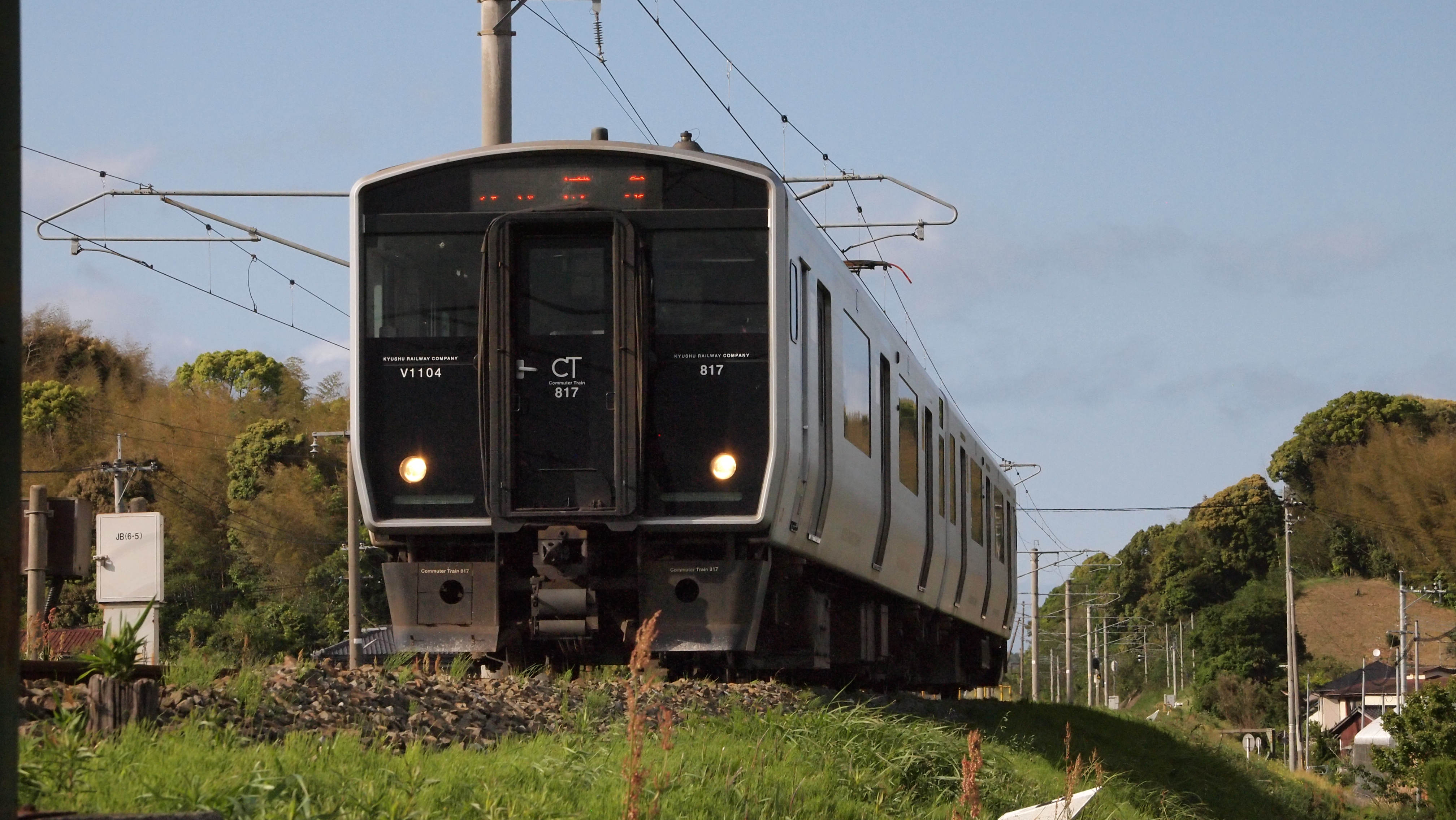 筑豊本線の列車（鞍手-筑前垣生）